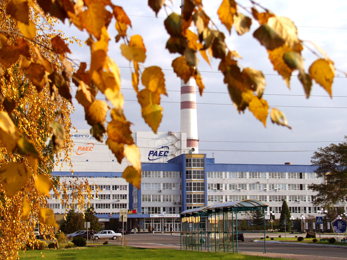 Ровенская АЭС осенью. Кузнецовск. Украина.